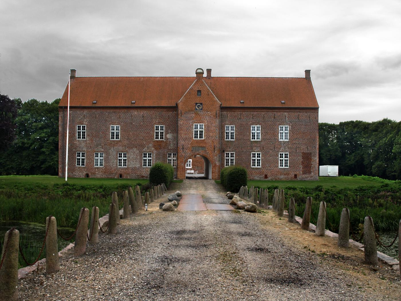 Dänemark Saeby (Nordjütland)Saebygaard Nordfassade, Foto 2013